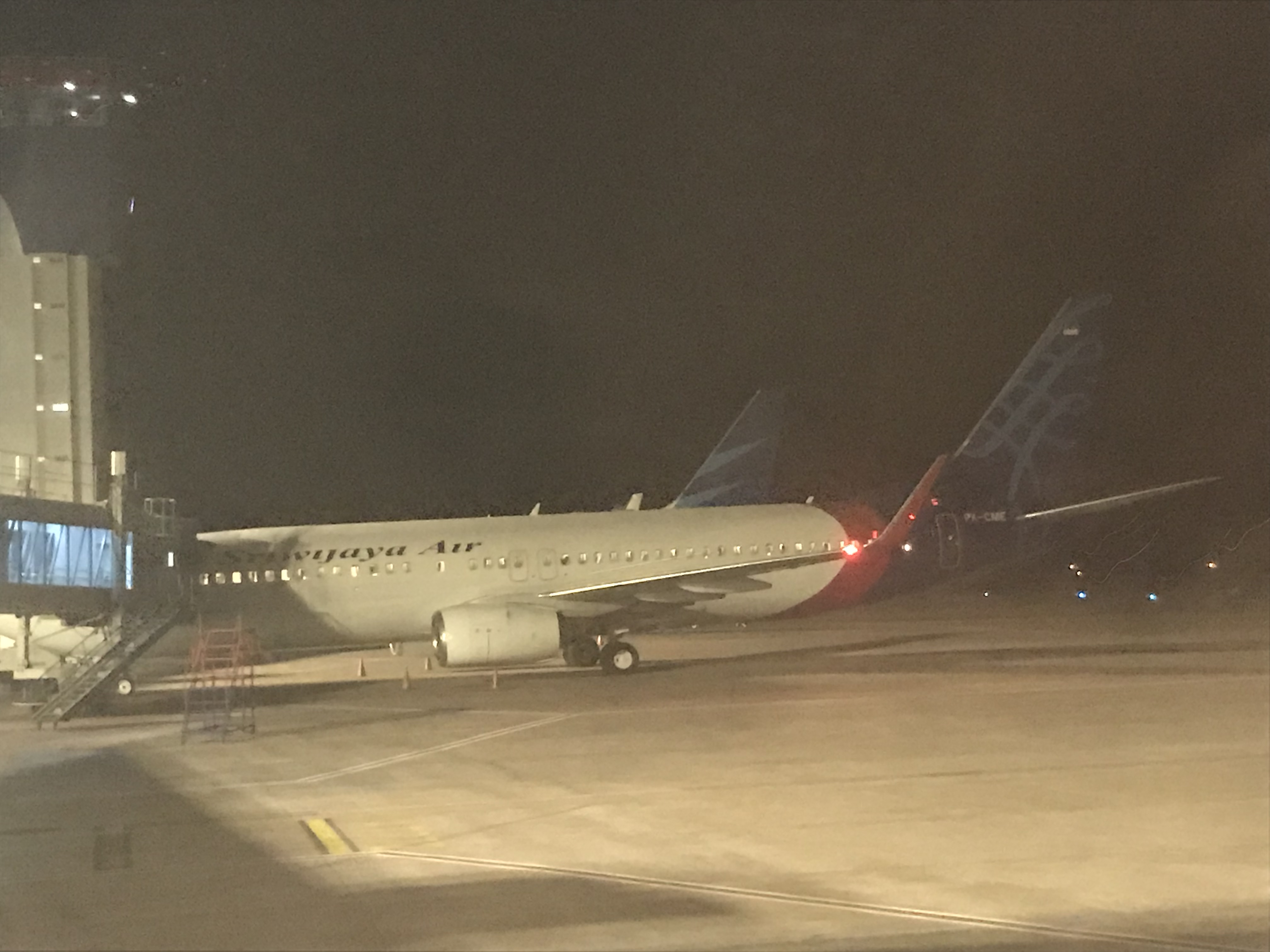 Imej ini diambil di Lapangan Terbang Supadio